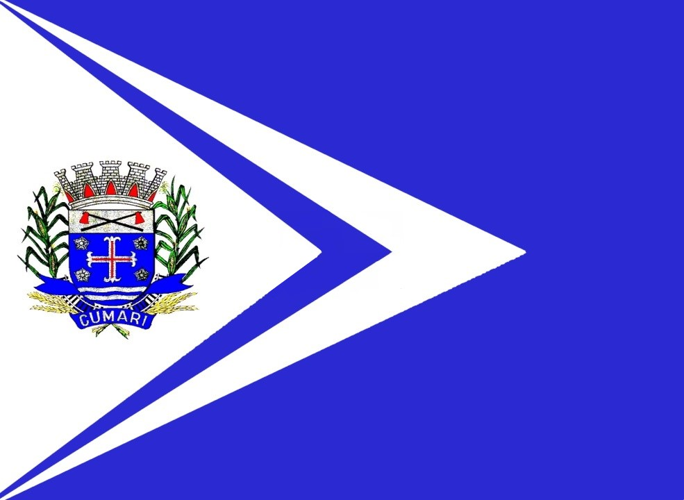 Bandeira do município goiano Cumari